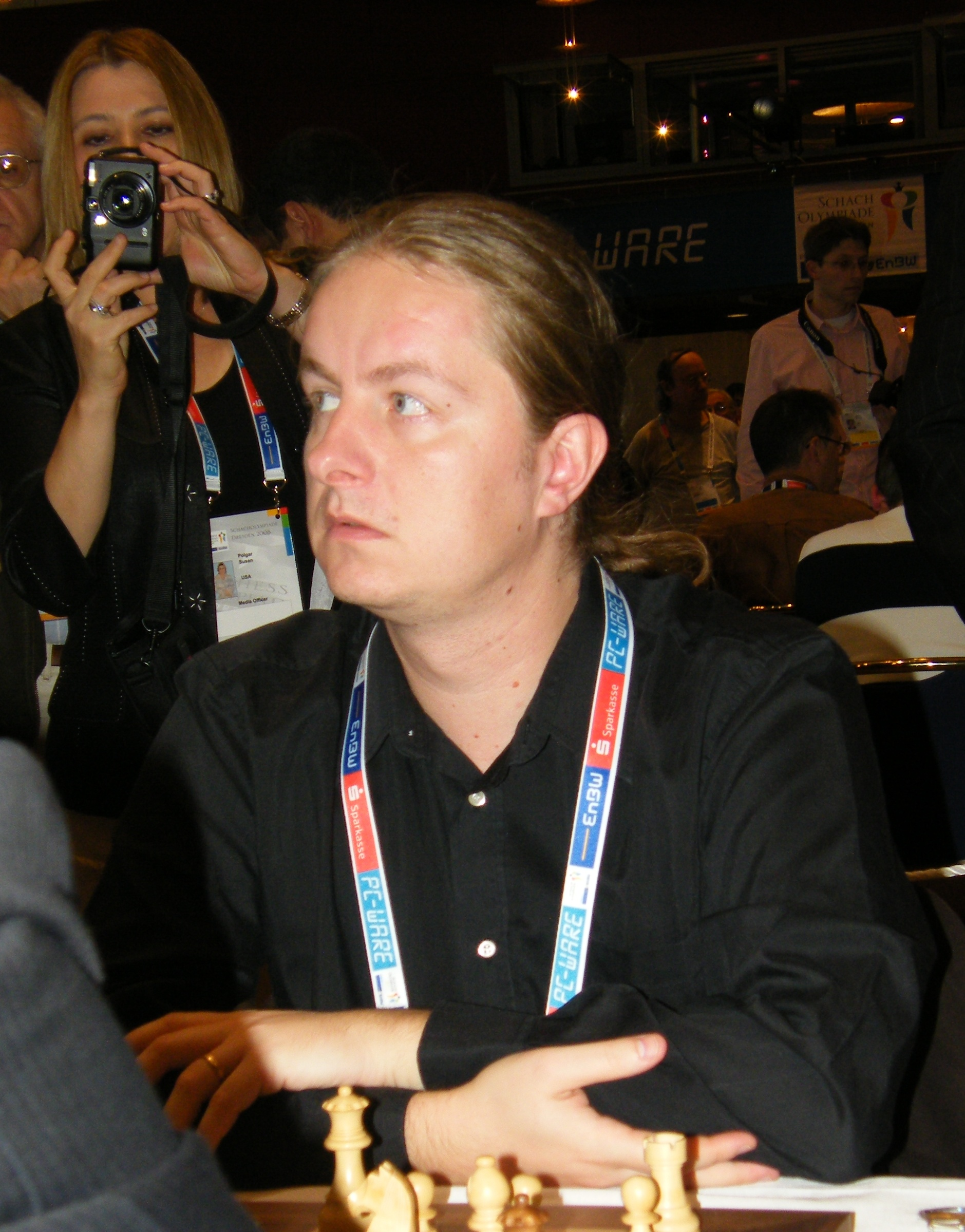 Liviu-Dieter Nisipeanu bei der 38. Schacholympiade in Dresden 2008, im Hintergrund Susan Polgar als Papparazzo